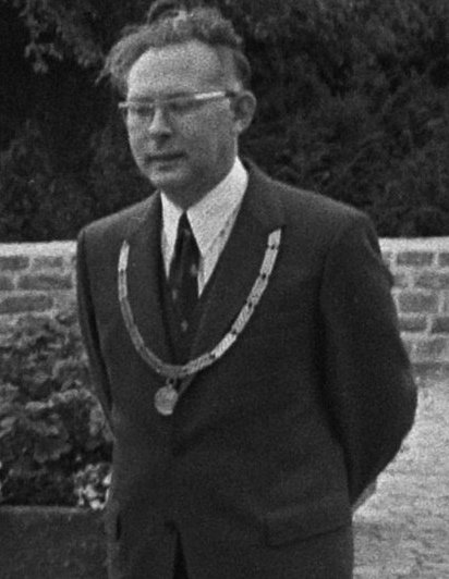 Vlnr mr. Vrolijk, commissaris der koningin in Zuid-Holland, prof. Van der Kieft, koningin Juliana en De Roos, burgemeester van Rijnsburg